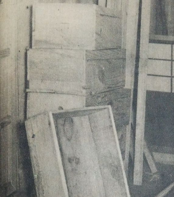 寿産院事件被害児らの骨が仕舞われていた米櫃